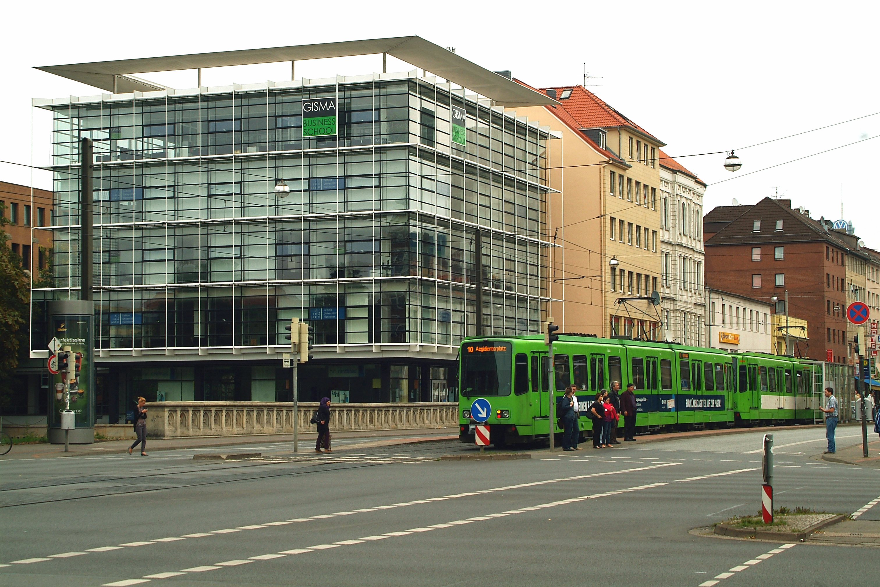 Vor der ebenerdigen Stadtbahn-Haltestelle Clevertor auf der Goethebrücke ist die Straßenquerung für Fußgänger ein nicht ungefährliches Unterfangen ...